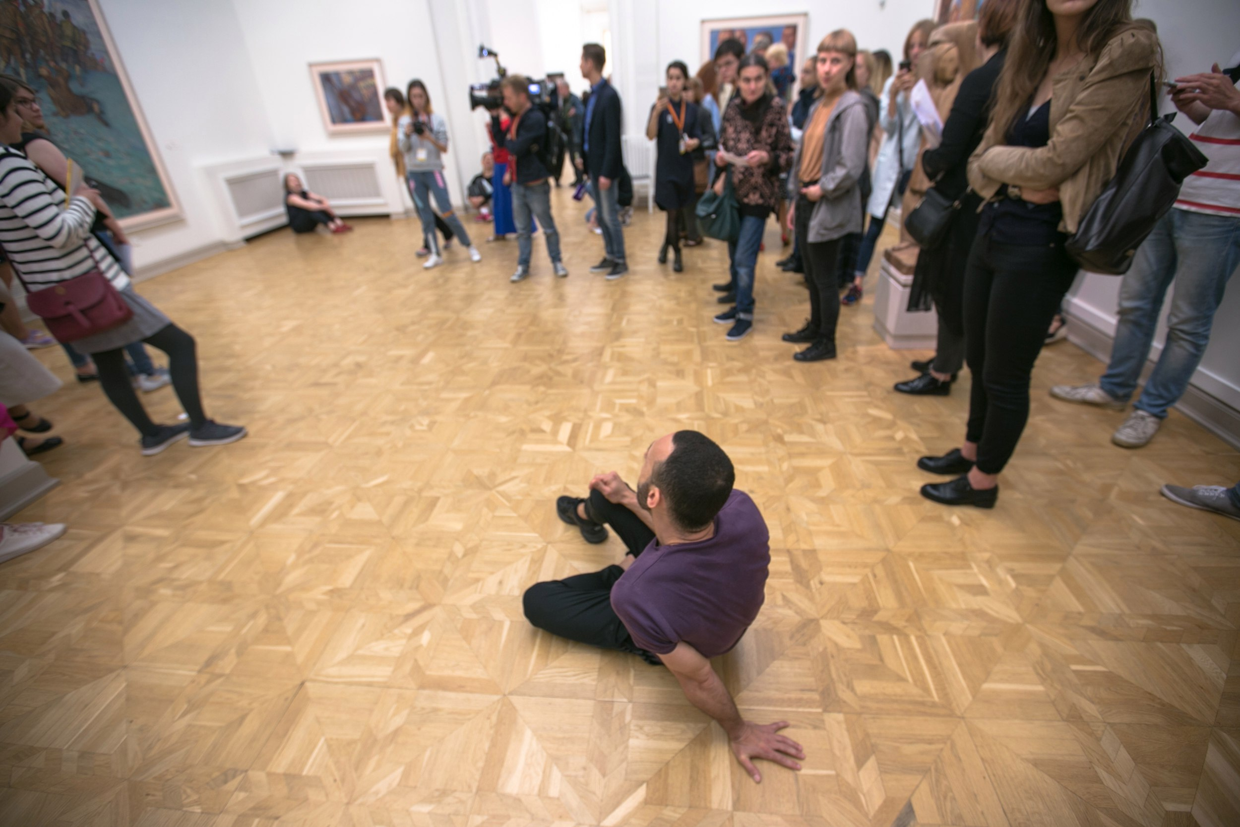 Художественная акция «Хрупкие инструменты вовлечения» Александра Пиричи Третий международный Летний фестиваль искусств «Точка доступа»